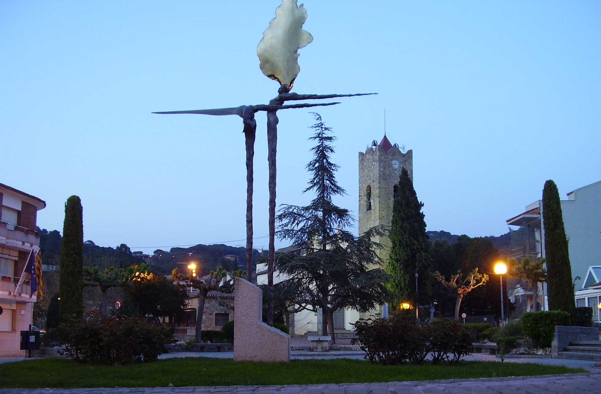 Vallromanes, la plaça de l'Església